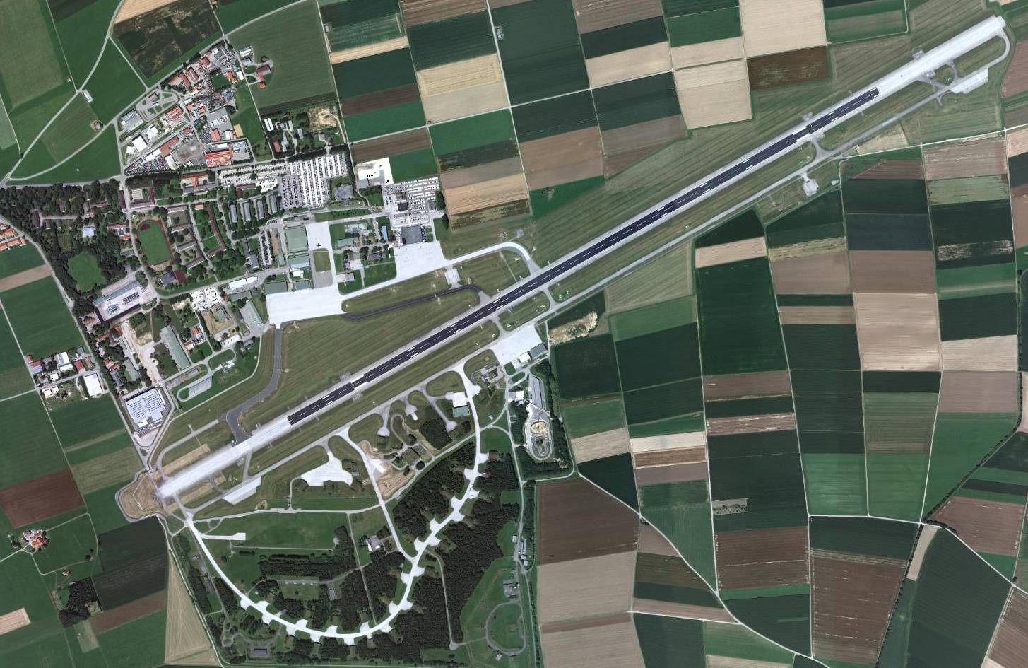 Ortophoto des Flughafen Memmingens